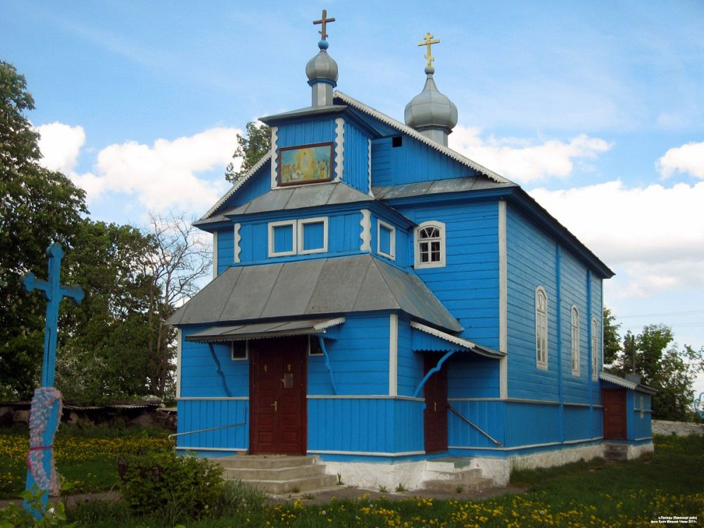 Паніквы. Свята-Успенская царква